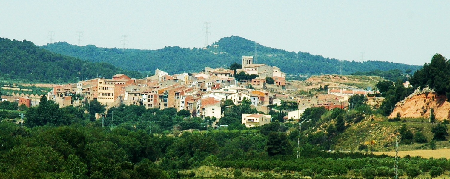 Vimbodí, Conca de Barberà, Catalonia